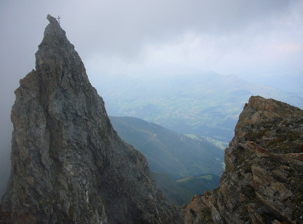 Blick vom Piz Fess 2876 auf den Bös Fess 2880 m.ü.M.